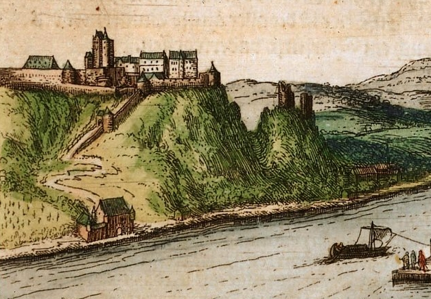 Ehrenbreitstein und Helfenstein (Ausschnitt aus der Stadtansicht von Braun & Hogenberg)